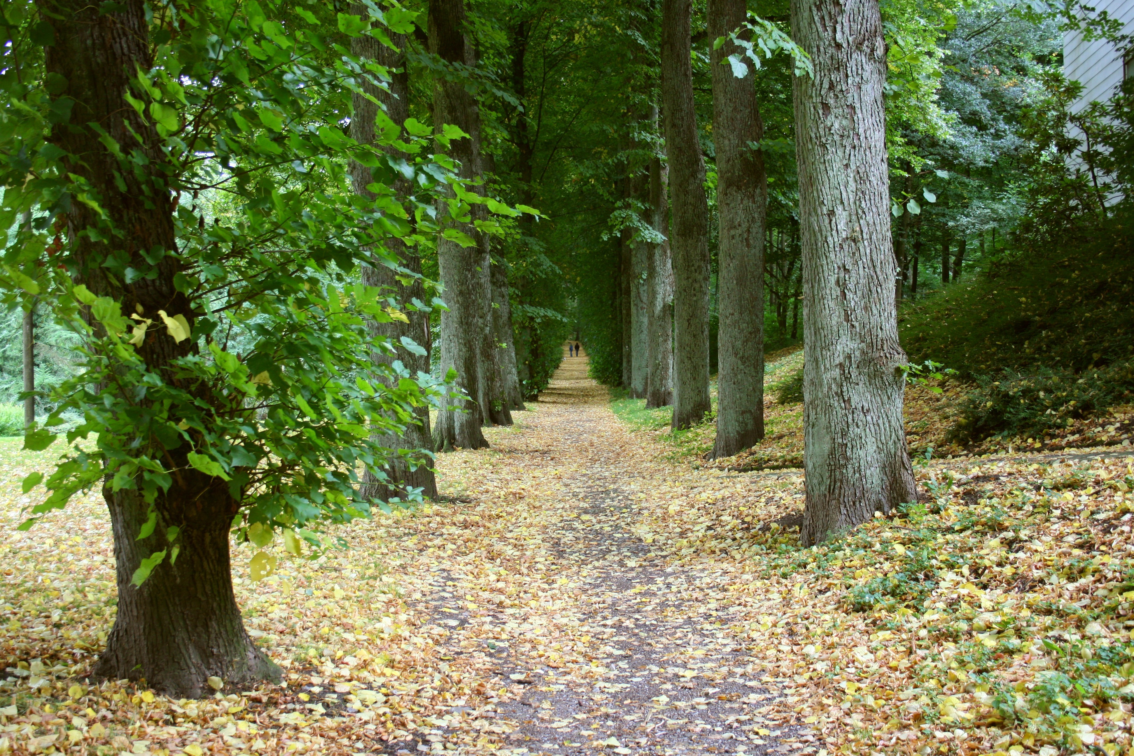 Barmer Anlagen in Wuppertal-Barmen